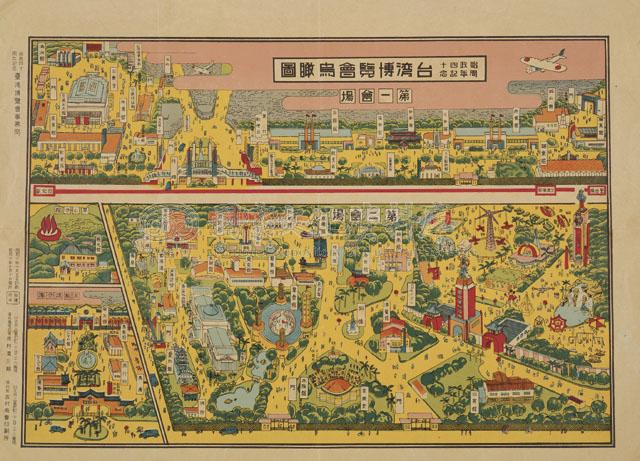 中文（台灣）: 1935始政四十週年台灣博覽會會場鳥瞰圖。